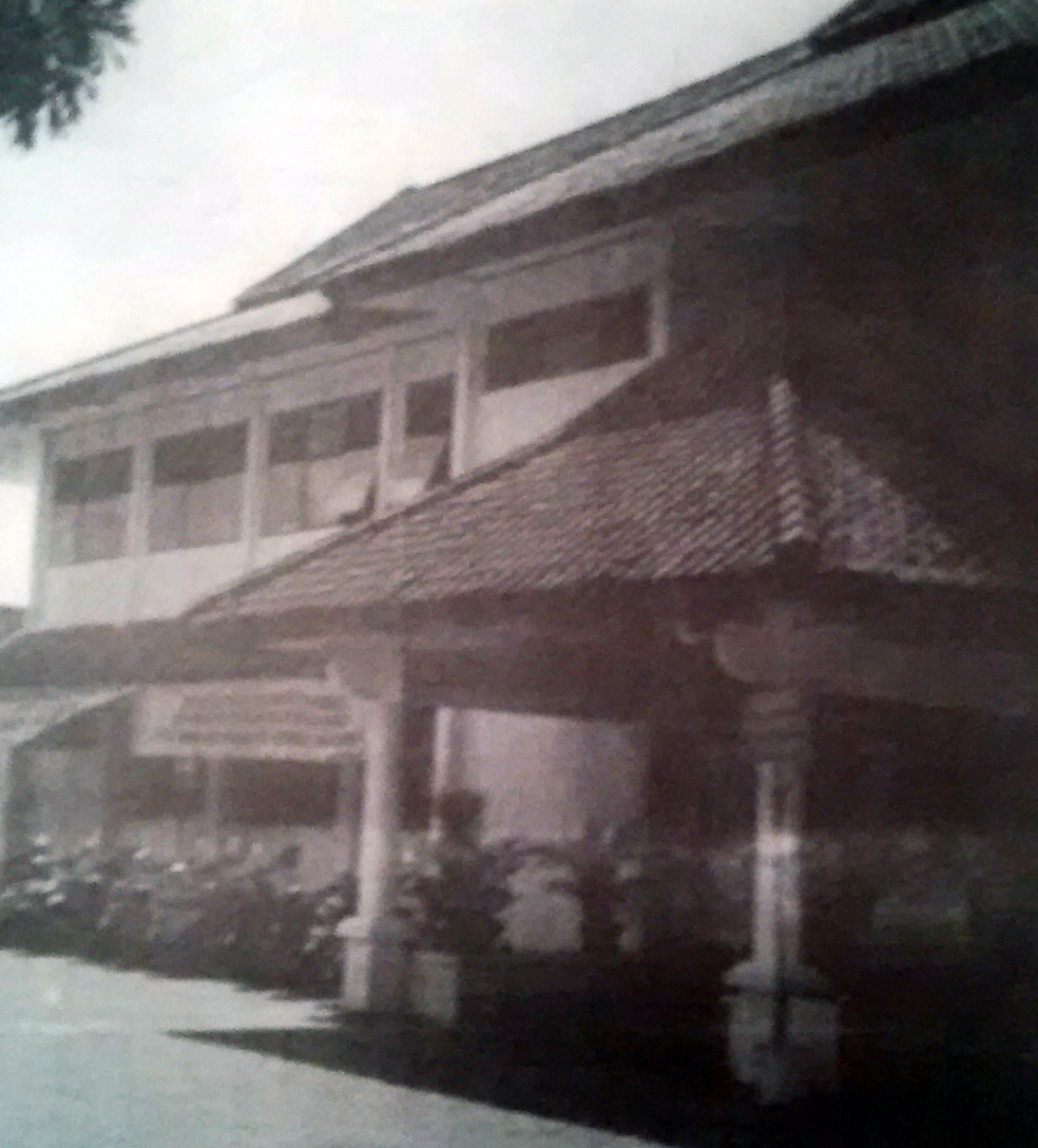 Tampak Samping